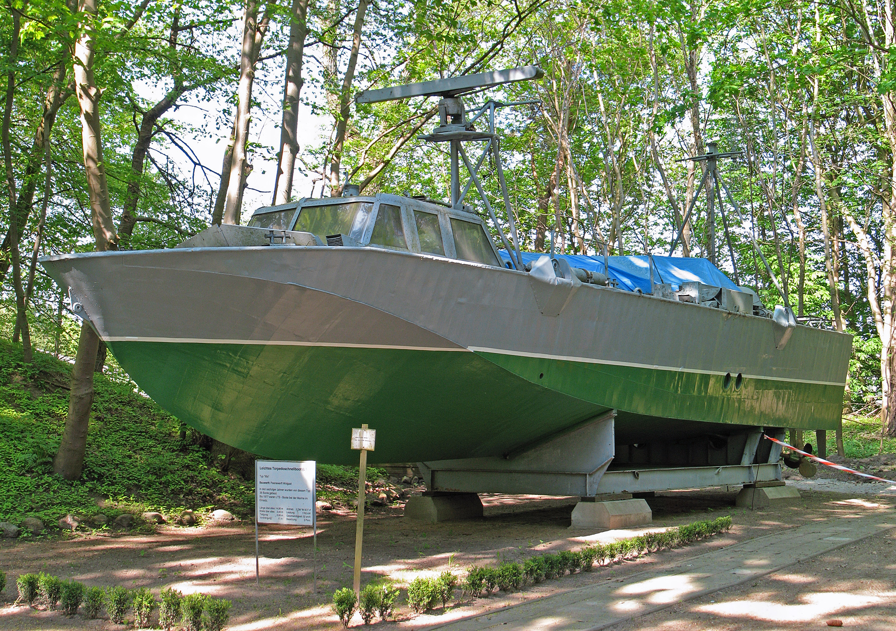 Dieses Bild zeigt ein Leichtes Torpedoschnellboot (LTS) der Volksmarine im Marinemuseum Dänholm. Typ: Schnellboot Projekt 63 / 63.300 Iltis Typ LTS Bauwerft: Peenewerft Wolgast Stückzahl: 36 Länge ü.A.: 14,9 m Breite ü. A.: 3,4 m Tiefgang: 0,60 m Antrieb: Zwei Dieselmotoren M 50 F 4 mit 1765 kW auf 2 Schrauben Geschwindigkeit: 52 kn Bewaffnung: zwei Torpedorohre (Ø 533 mm) Besatzung: 3 Mann Im Einsatz bei der Volksmarine der DDR bis 1977. Other Versions